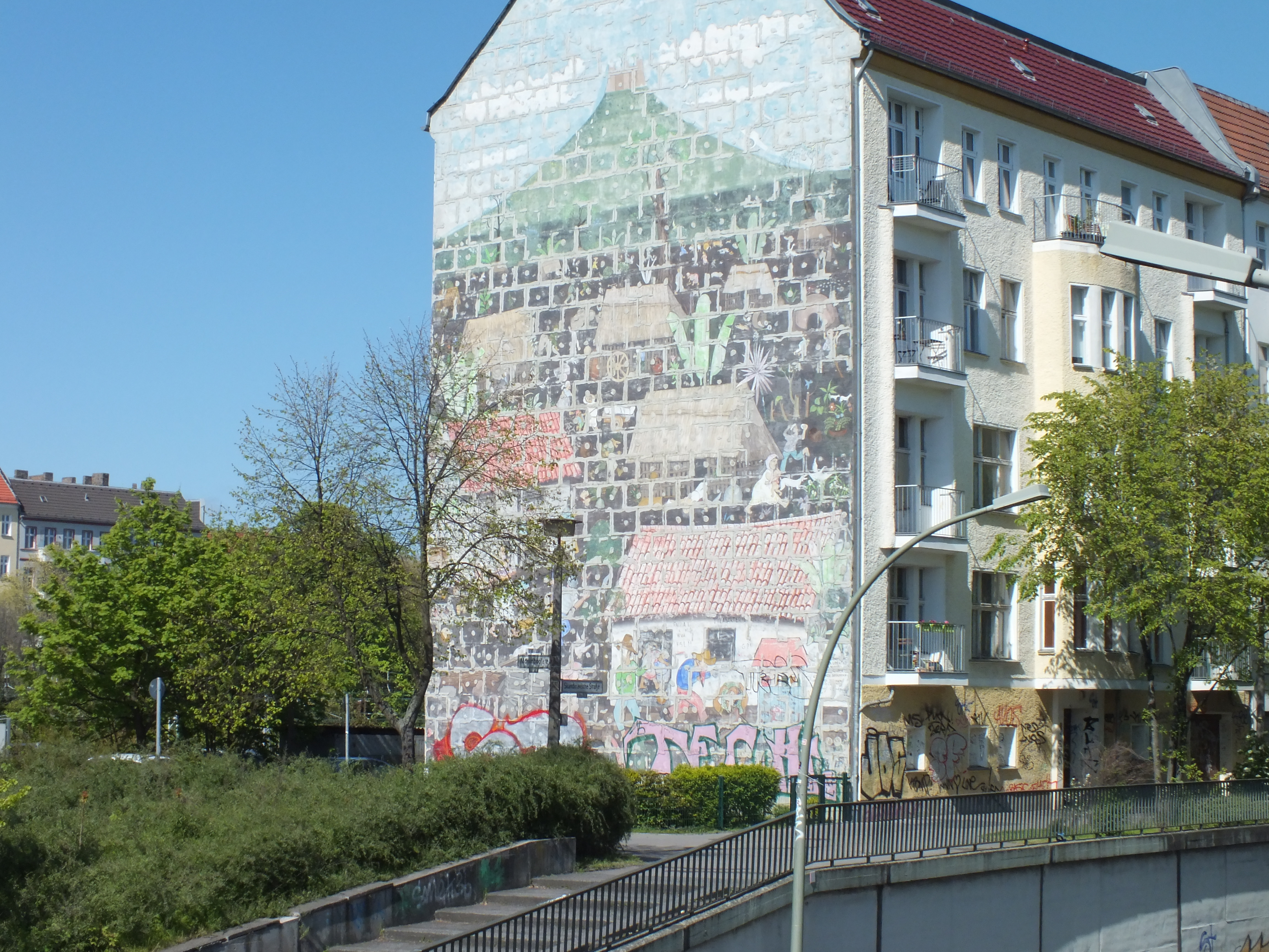 Skandinavische Straße, Giebelbild von García Moia, Original nach abgefallenen Kopienplatten